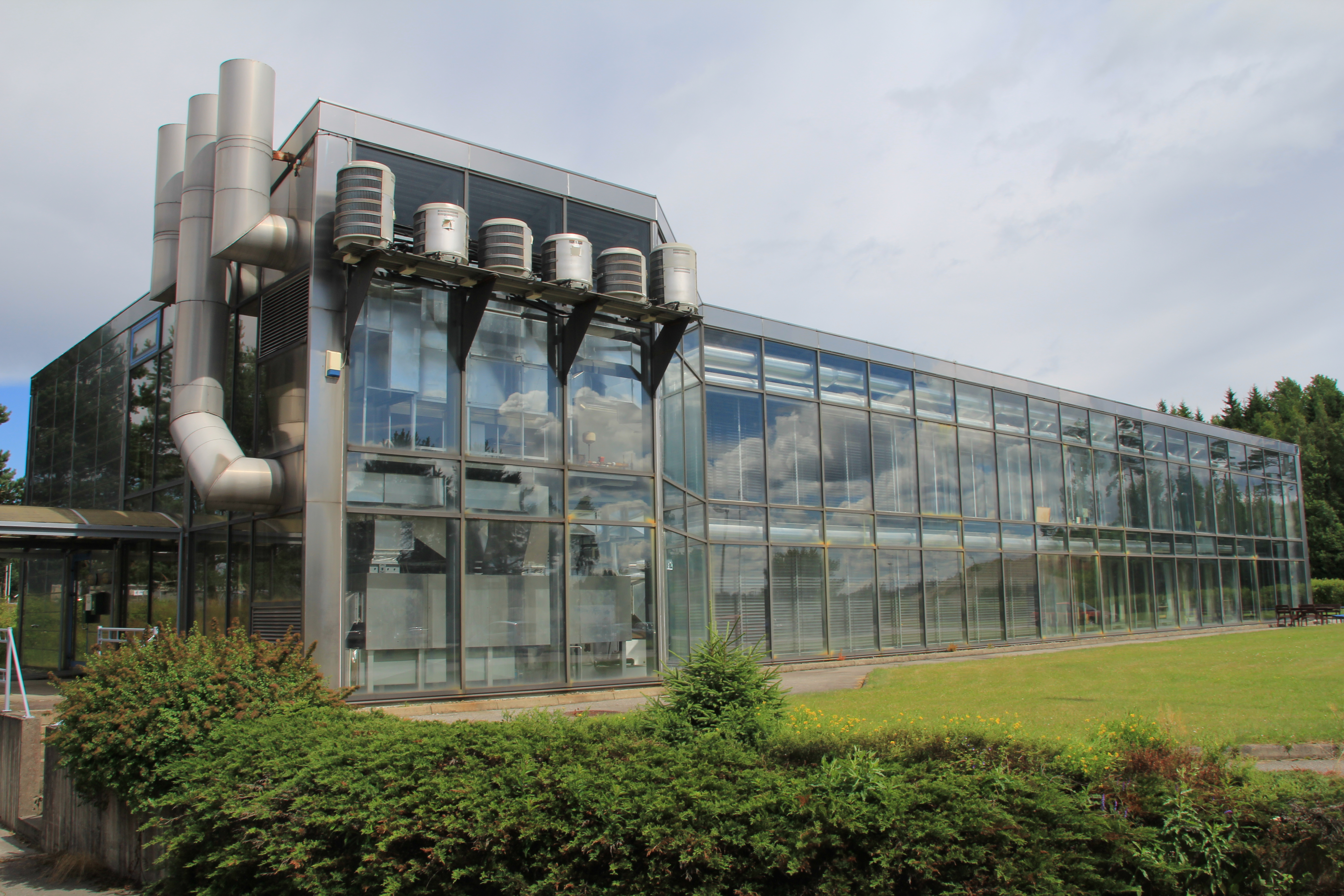 Indre Østfold meieri. Bygget av Meierienes Bygningskontor v/ Dag Borgen i samarbeid med arkitektontoret GASA. Ligger i Eidsberg kommune.